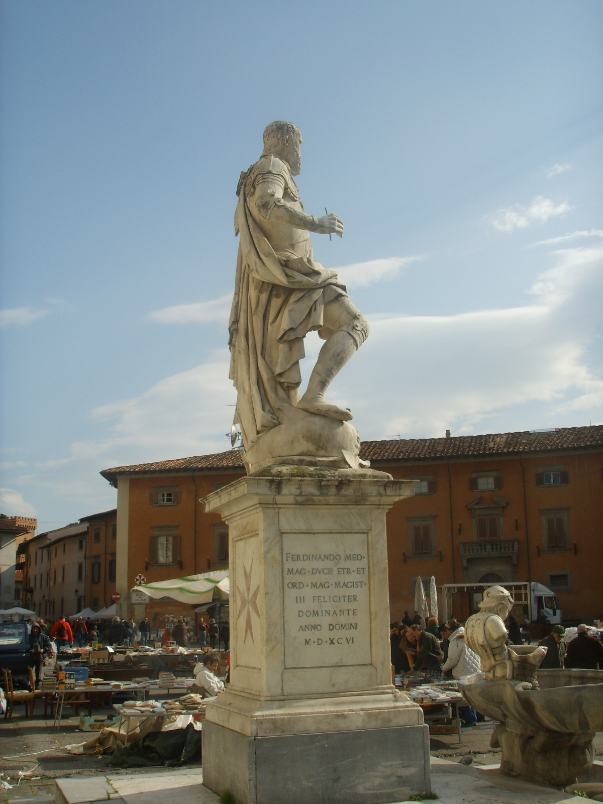 Monumento a Cosimo I de' Medici, in divisa da Gran Maestro dell'Ordine di Santo Stefano, l'ordine cavalleresco incaricato di combattere le navi barbaresche ed ottomane, che aveva la sua base a Pisa. La statua si trova in Piazza dei Cavalieri a Pisa, di fronte alla Scuola Normale.